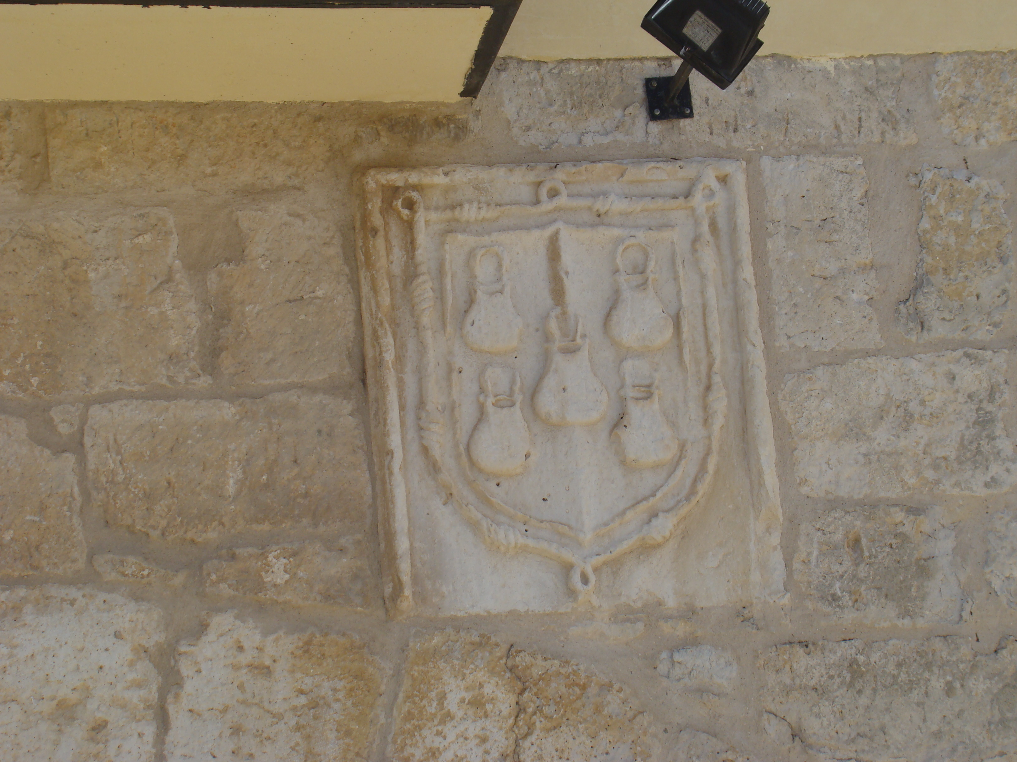 Casa Calderón Castro. Situada en la Calle Corro Vaca nº 5 de Cigales, Valladolid. Es la antigua casa de D. Francisco Calderón, mayordomo de los Duques de Frías. Construida entre finales del siglo XV y principios del XVI sobre zócalo de piedra. Tiene dos pisos. La portada es de piedra caliza y tiene un arco escarzano con grandes dovelas. A derecha e izquierda están labrados los escudos de los Calderón y los Castros. La casa sirve de sede para el Consejo Regulador de la Denominación de Origen de Cigales.